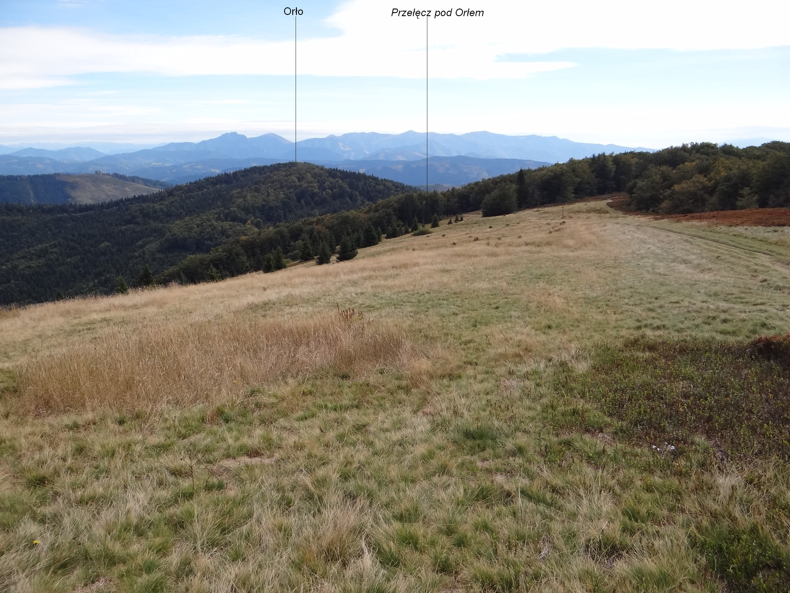 Widok z Hali na Małej Raczy